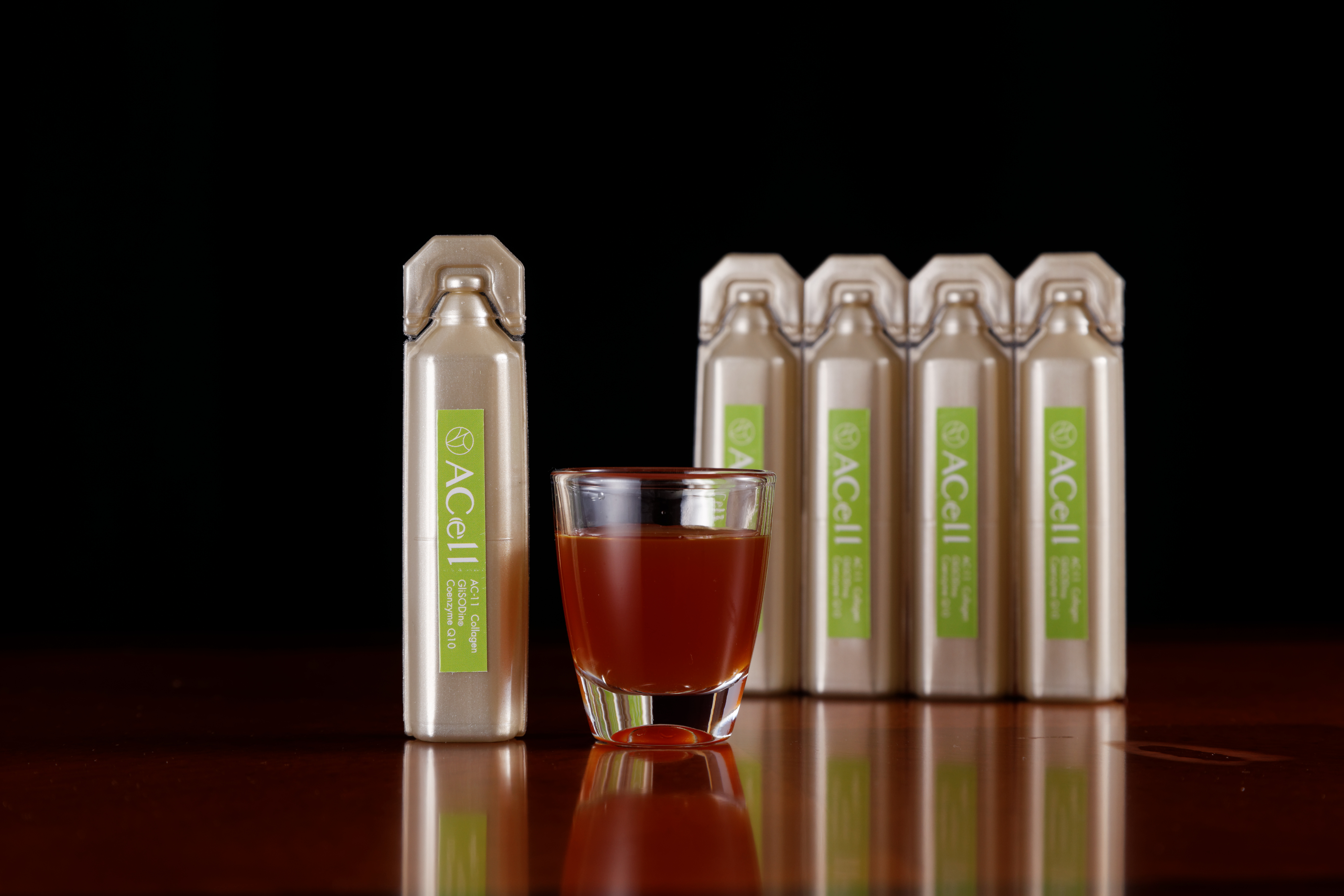 ACell